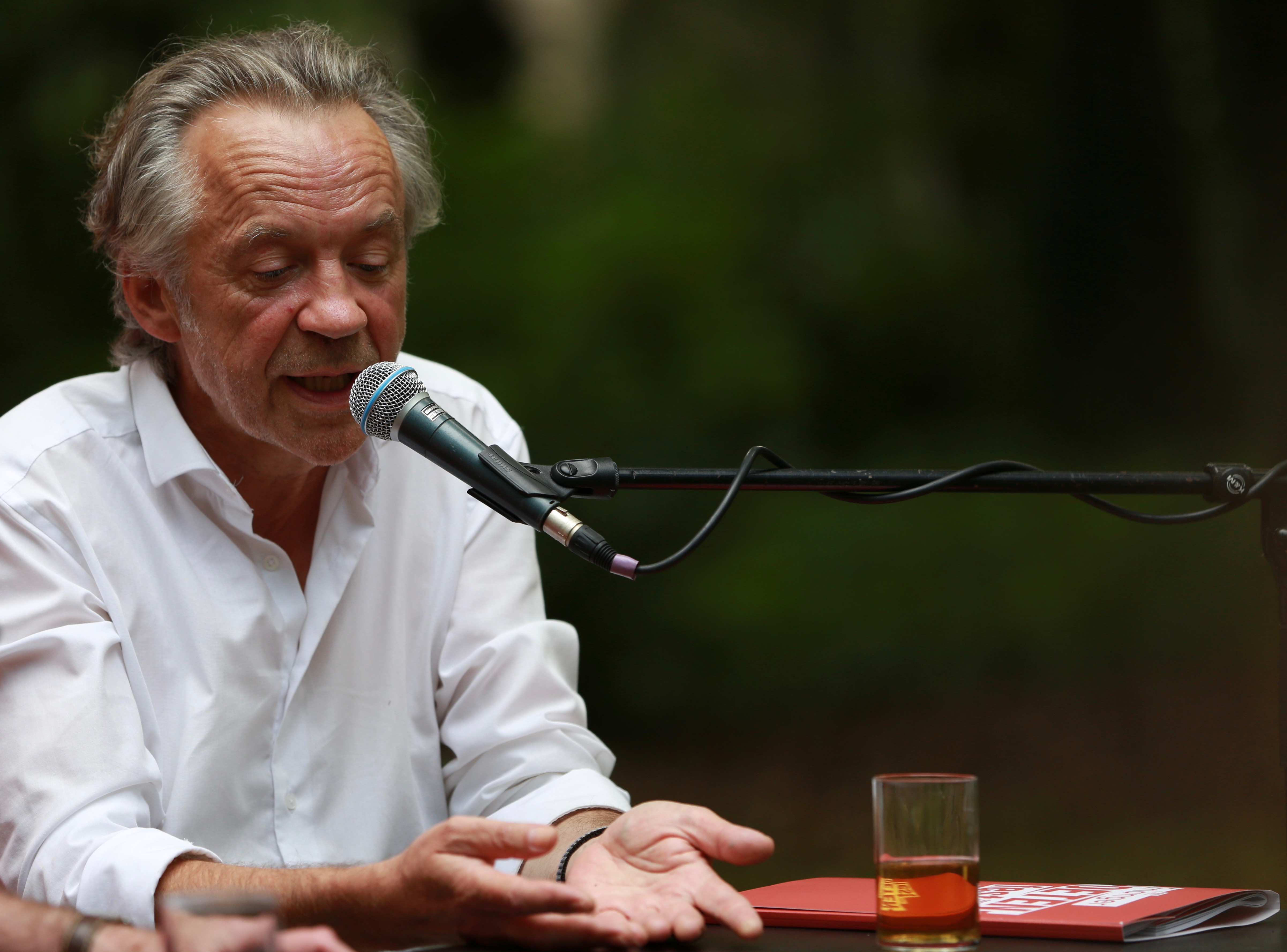 Der Schriftsteller Elmar Tannert auf dem Erlanger Poetenfest 2017